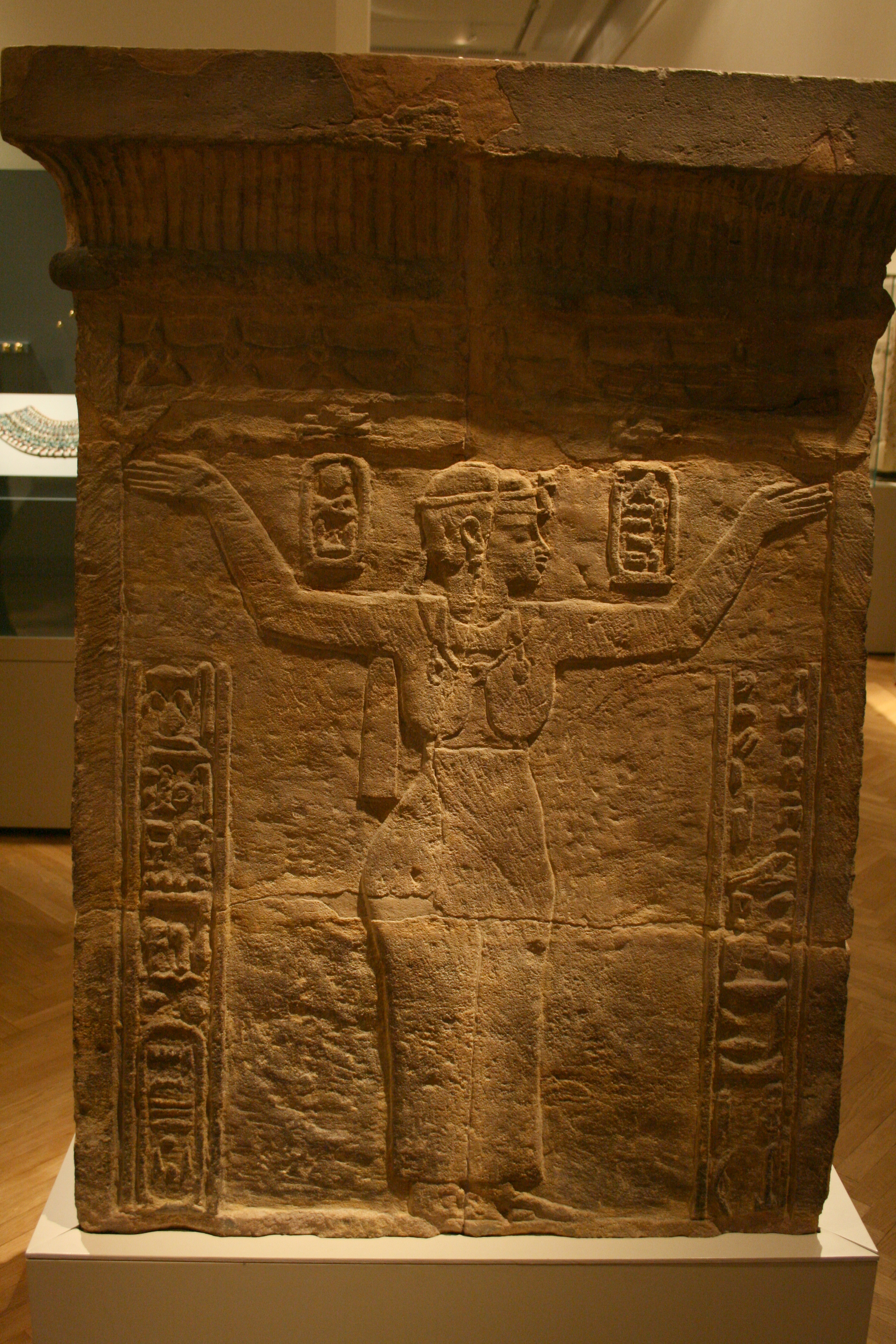 Barkenuntersatz des Natakamani und der Amanitore aus Wad Ban Naga (heute: Ägyptisches Museum Berlin, Inv. Nr. 7261)